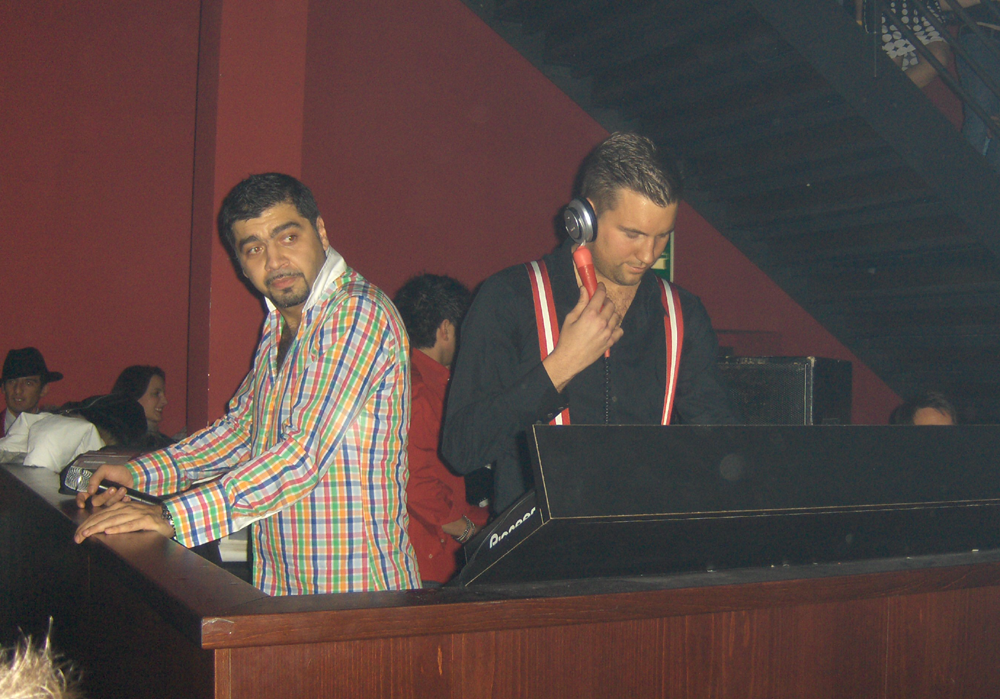 DJ Antoine and his MC Roby Rob in the Platins, Sihlcity Zurich, at the Silvester-Party